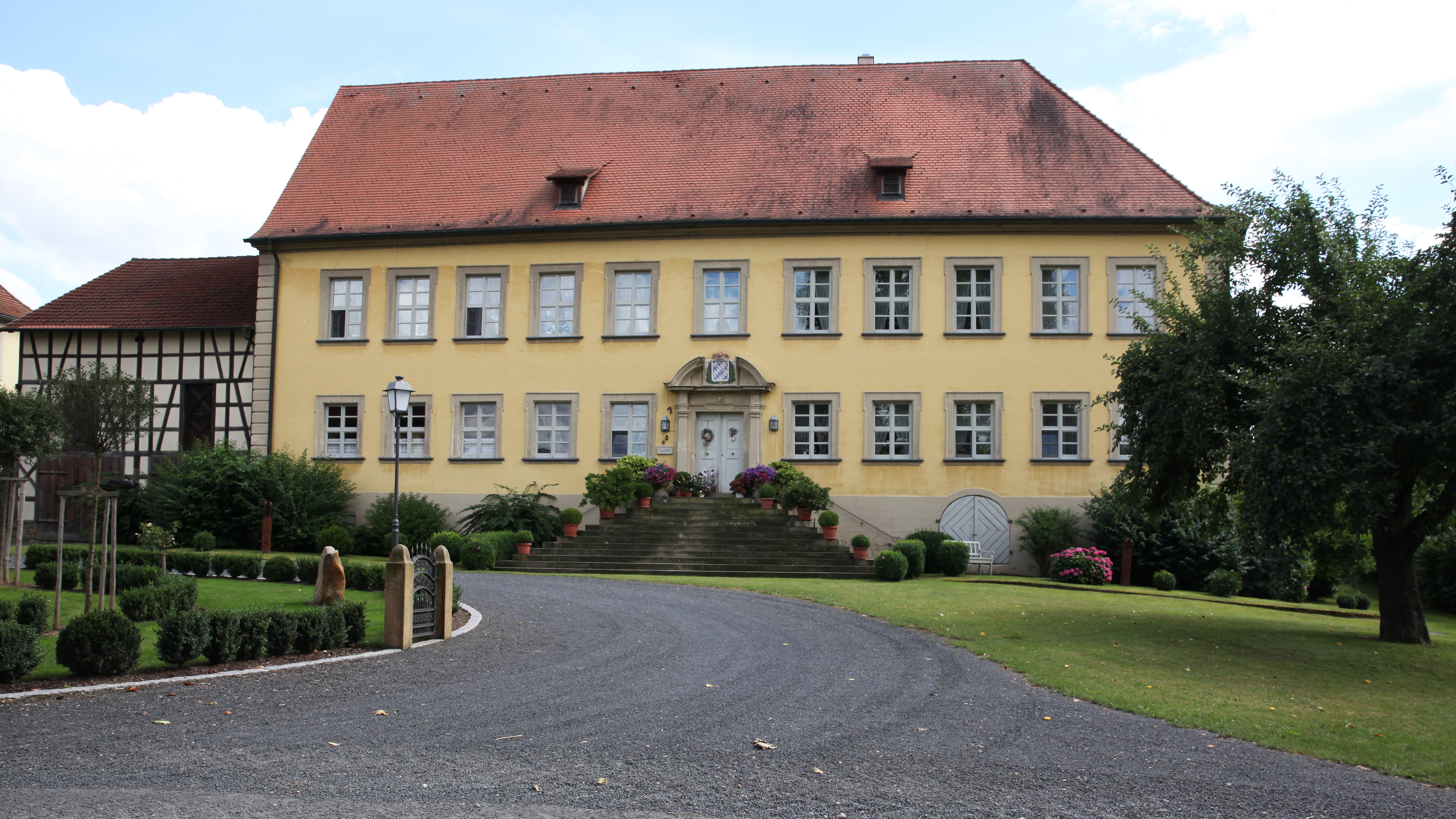 Schloss, Lahm im Itzgrund